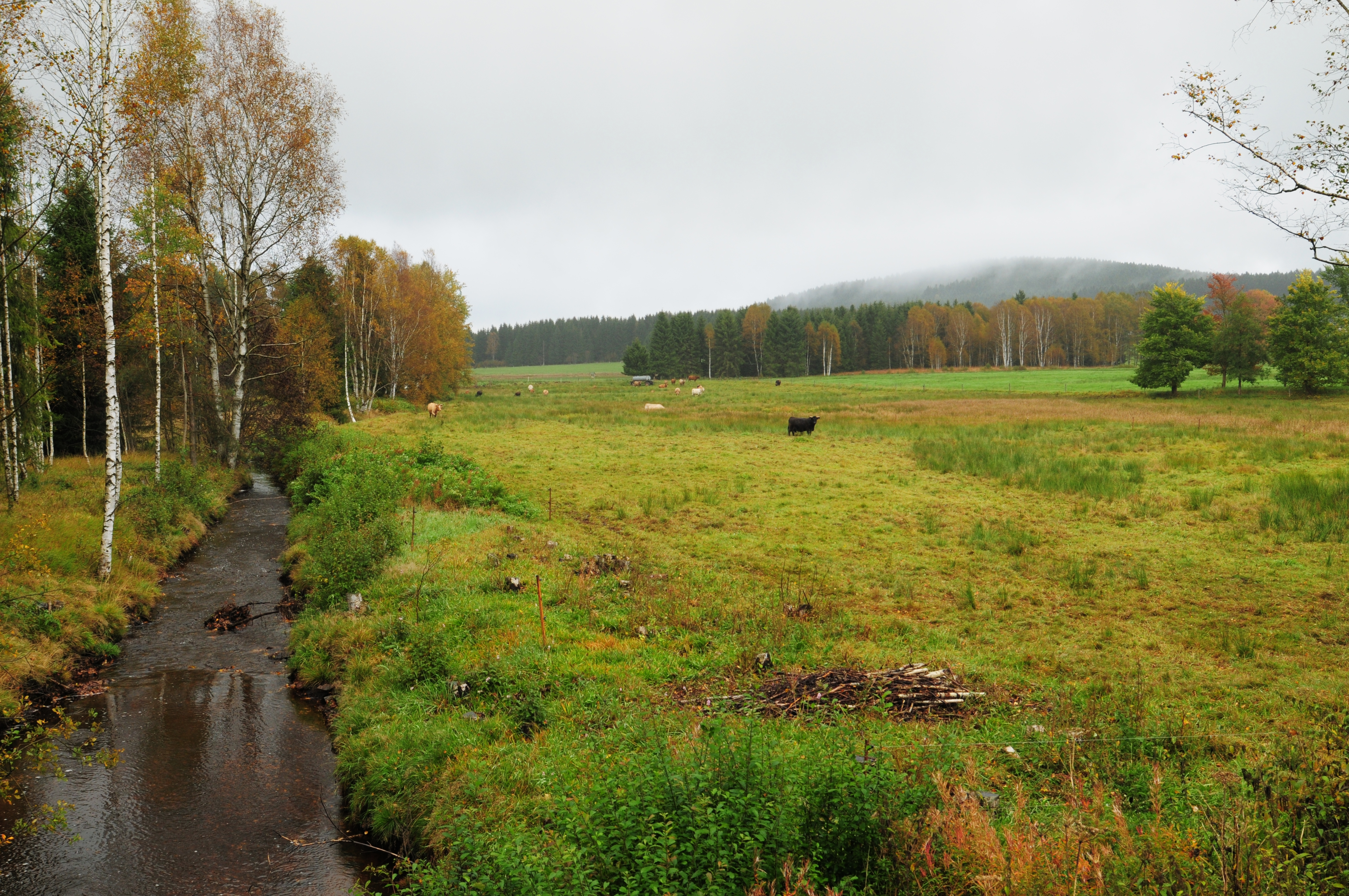 Hammerbrücke (Gemeinde Muldenhammer), NSG Muldenwiesen, Zwickauer Mulde, Blick zum Thierberg (783,8 m) (Vogtlandkreis, Sachsen, Deutschland)